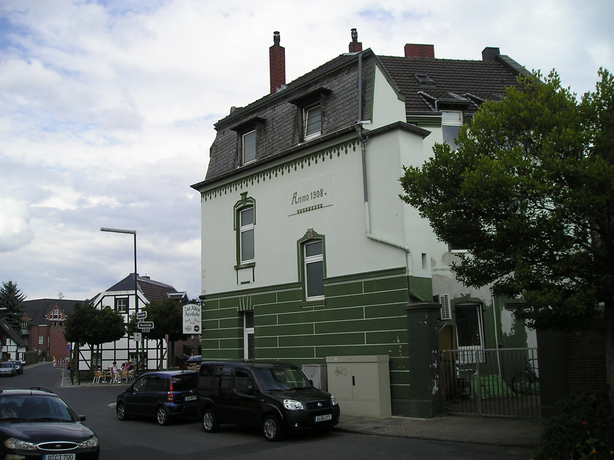 Rock- und Blueskneipe "Zur Alten Apotheke" in Düsseldorf-Urdenbach